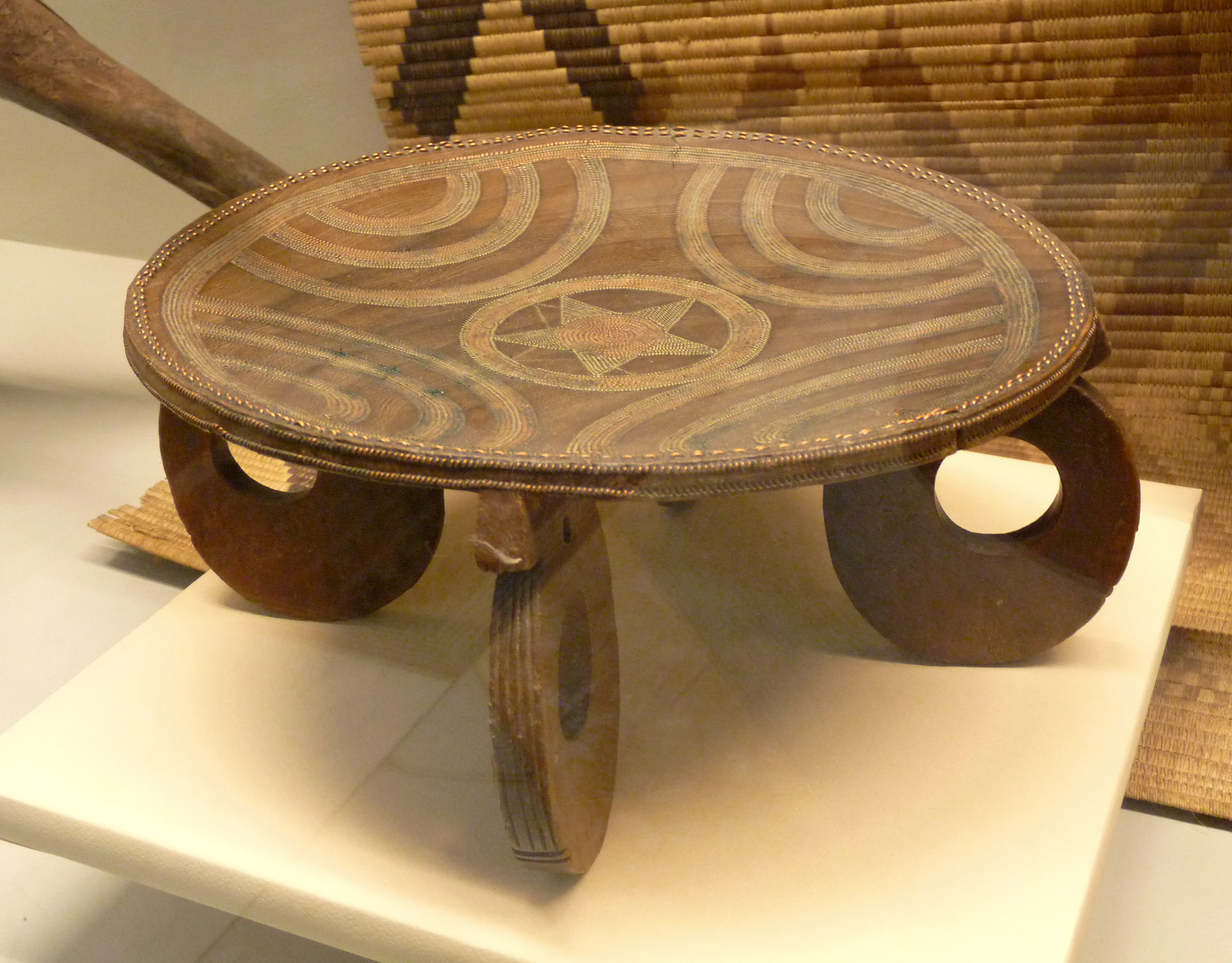 Kamba (Kenya) : tabouret. Musée royal de l'Afrique centrale